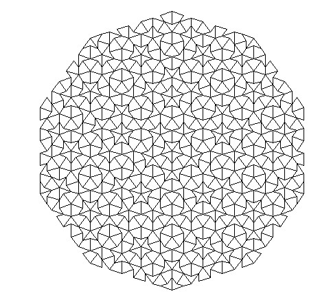 Egy Penrose-féle nem periodikus csempézés